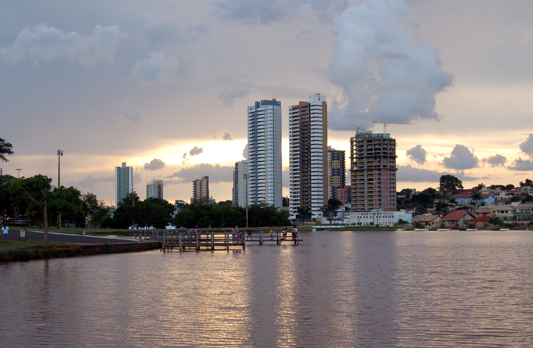 Parque das Nações Indígenas em Campo Grande, Mato Grosso do Sul, Brasil